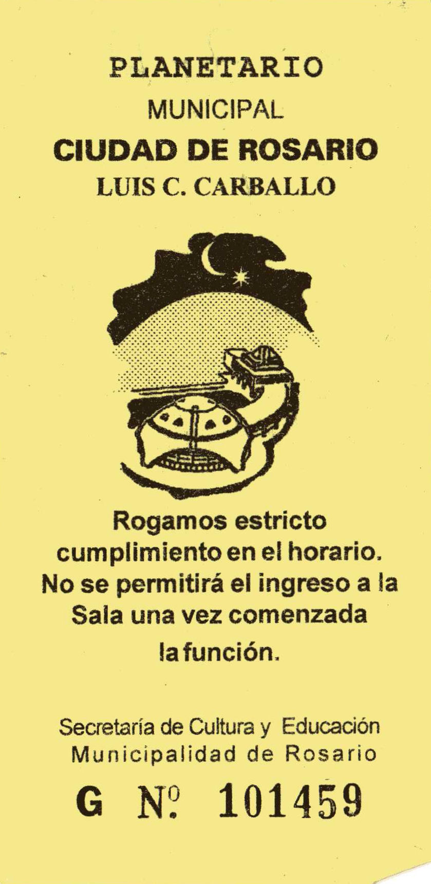 Entrada para ver el espectaculo del planetario de Rosario.